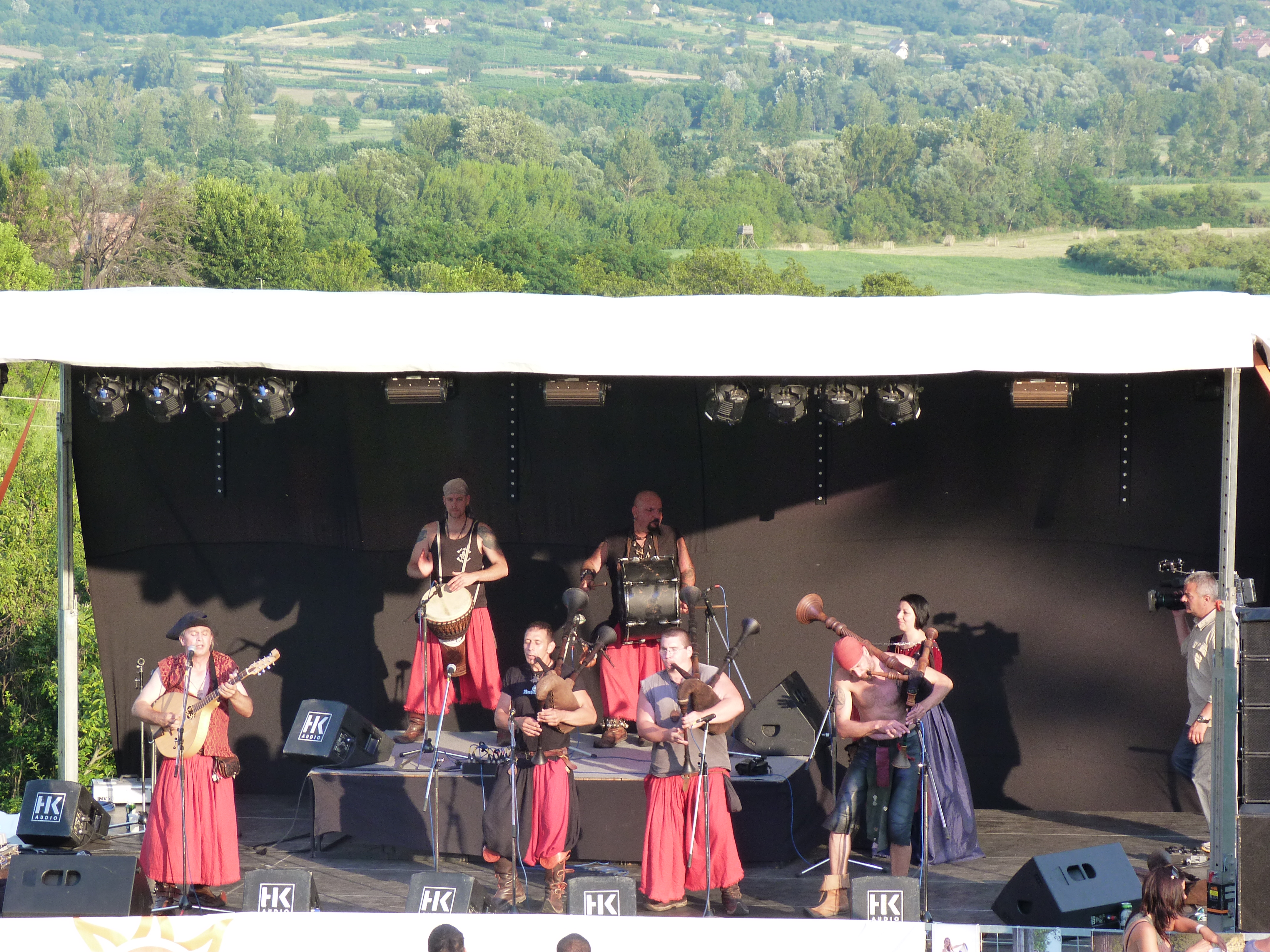 A felvételek 2014. július 5-én készültek a Ghymes Fesztiválon. A Szent György Pince, Nagyszínpad. A Fesztivál, melyet 9. alkalommal rendezett meg Szarka Gyula és Szarka Tamás 2014. július 4-től 6-ig tartott Hegymagason. Szerenád a pincében – kamarazenekari koncert. Szarka Gyula pincéje (Hegymagas, Petőfi Sándor utca 9. szám). Horváth János zongora, Szarka Mátyás – nagybőgő, Csikmák Katalin Mária Székely mesebeszéd, Siklós Csenge Csikmár Katalin, Siklós Csenge - Csángó Miatyánk, Forrás: ghymes.hu